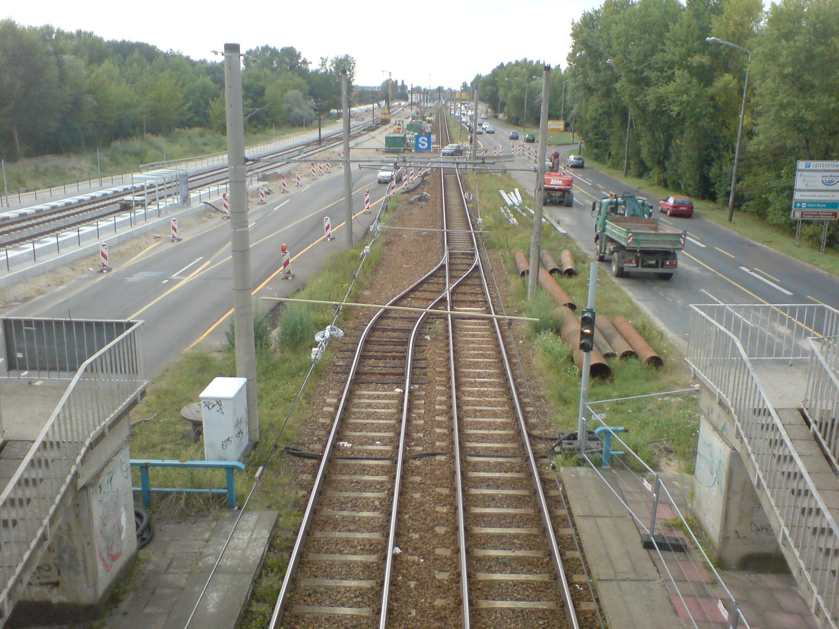 Situation der Straßenbahn in Zentrum-Ost während der Baumaßnahmen im Sommer 2008. Künftig wird die Strecke an der Seite der Nutheschnellstraße (neue Strecke links im Bild) geführt. Während der Baumaßnahmen wurde zwischen den Haltestellen Holzmarkststraße und Alt-Nowawes ein eingleisiger Betrieb durchgeführt, mit einer Ausweiche an der Hst. Humboldtring, die hier im Bild ist.